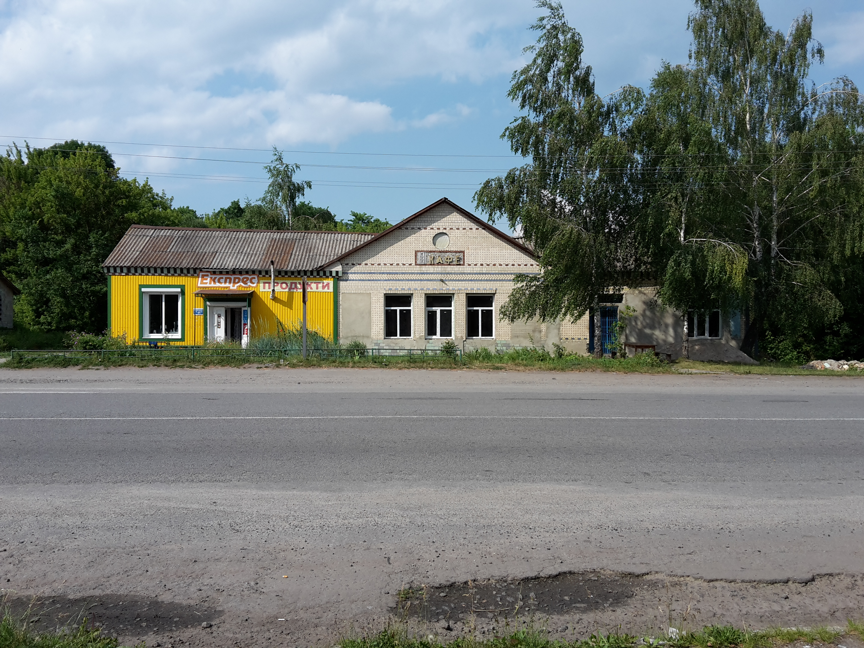 Магазин в селе Хролин, Шепетовский район, Украина, 2016 год